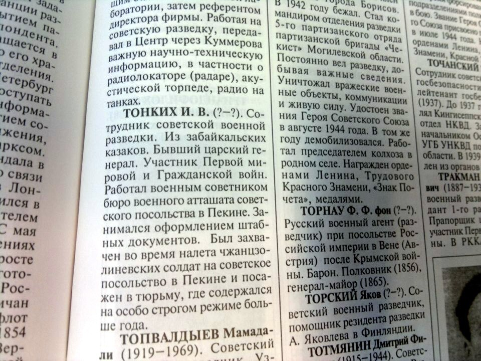 запись в энциклопедии военной разведки